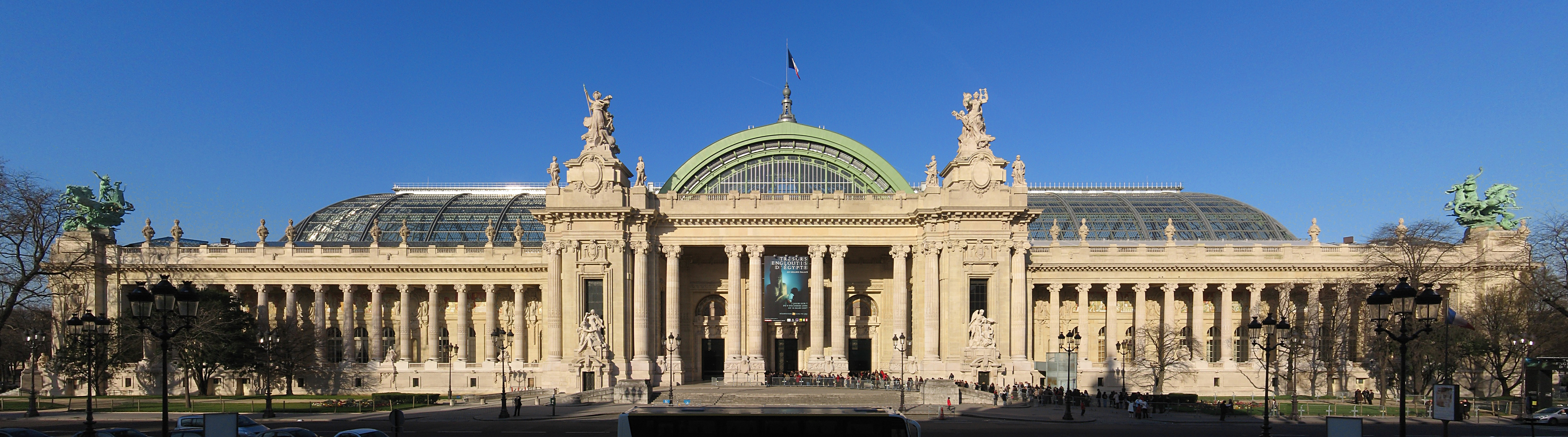 Panoramique Grand Palais à Paris